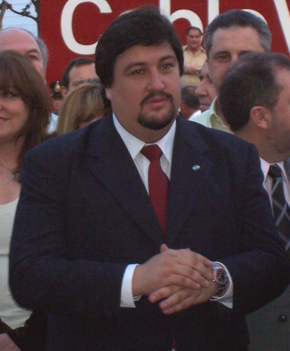 Maurice Closs, senador Nacional por la provincia de Misiones y actual candidato a gobernador, en la inauguración de la Fiesta Nacional del Inmigrante en Oberá.